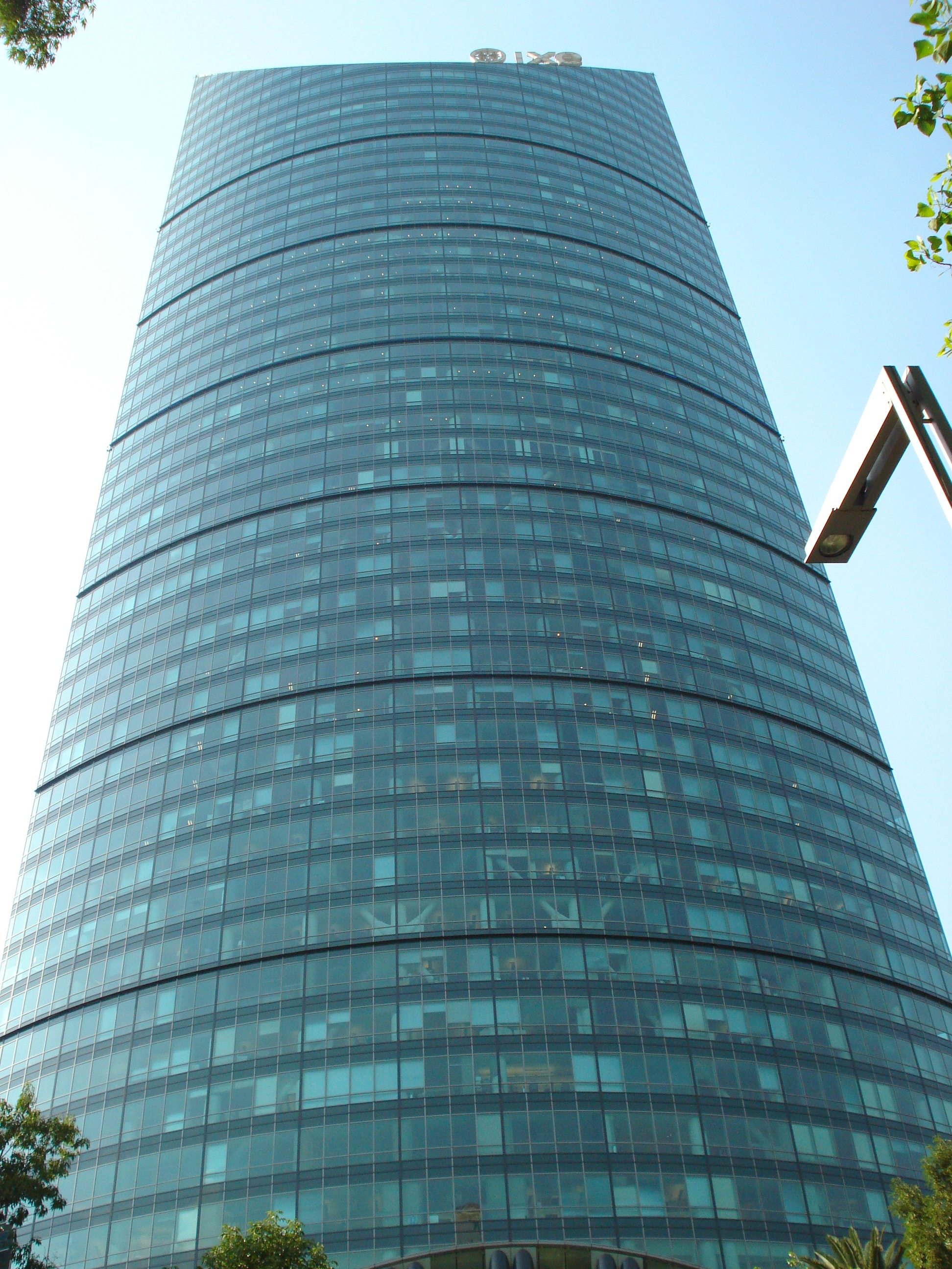 Torre Mayor desde el Paseo de la Reforma en la Ciudad de México.